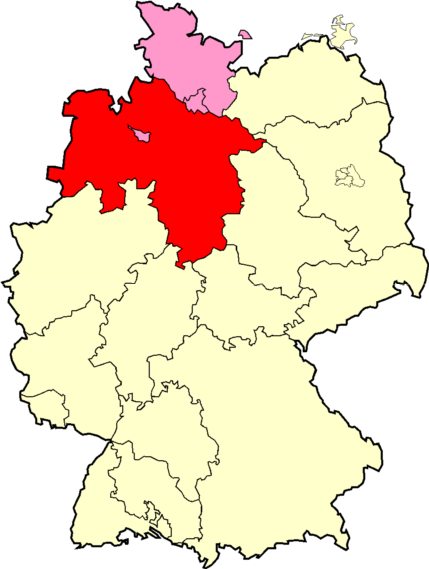 Logo de la NFV (Niedersachsen) au sein de la NFV Catégorie:Football en Allemagne